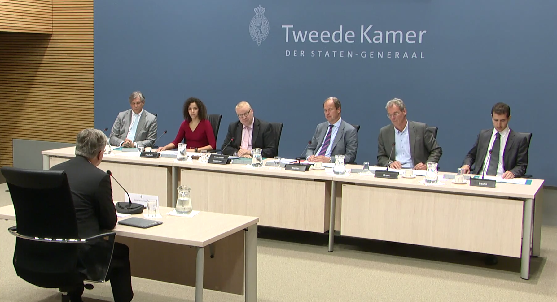 Parlementaire enquêtecommissie Woningcorporaties - Openbaar verhoor dag 1 - Arnold Moerkamp (Oud-directeur Strategie en Financiën bij het voormalig ministerie van VROM).